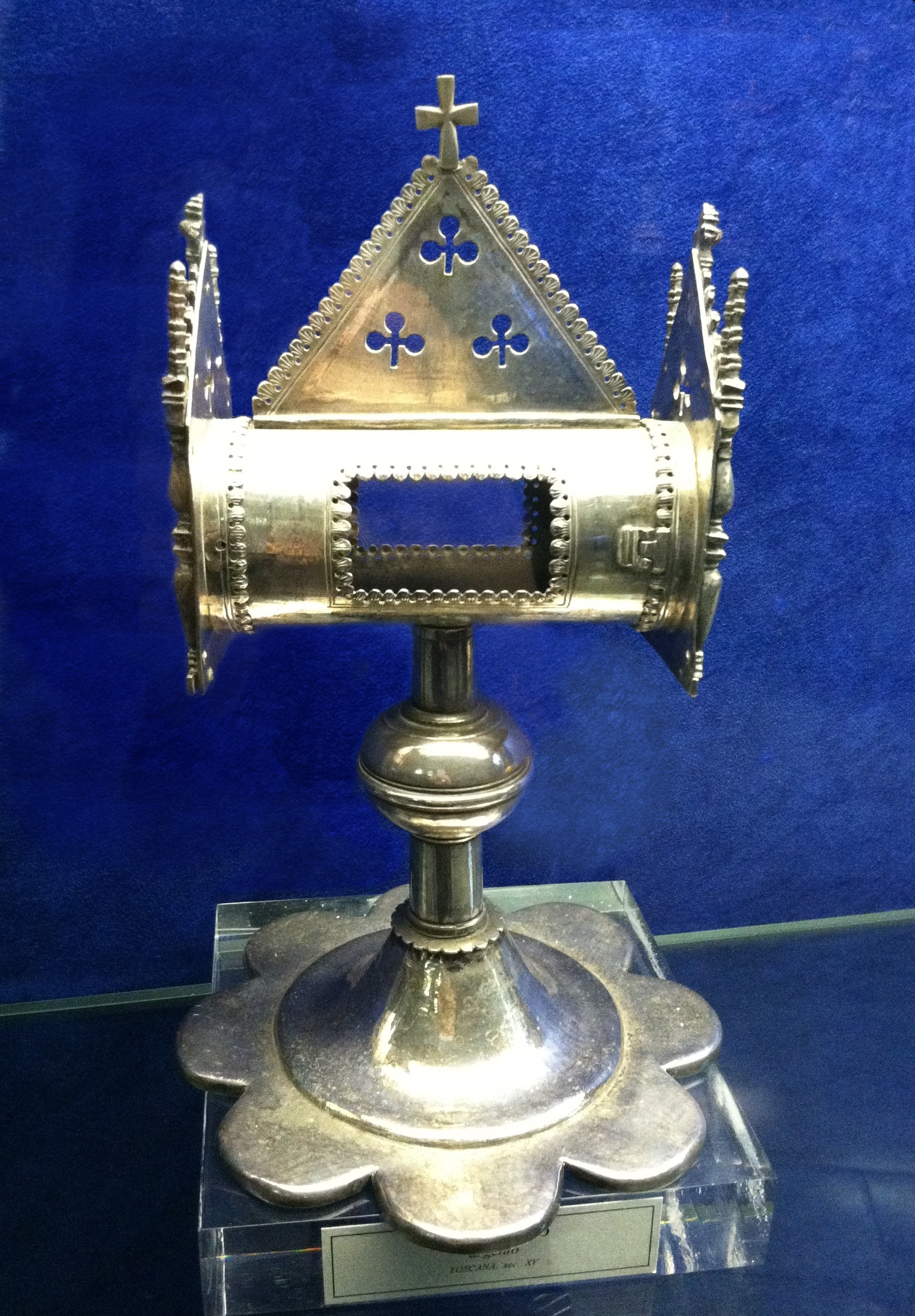 Reliquario Tuscano Sec. XV